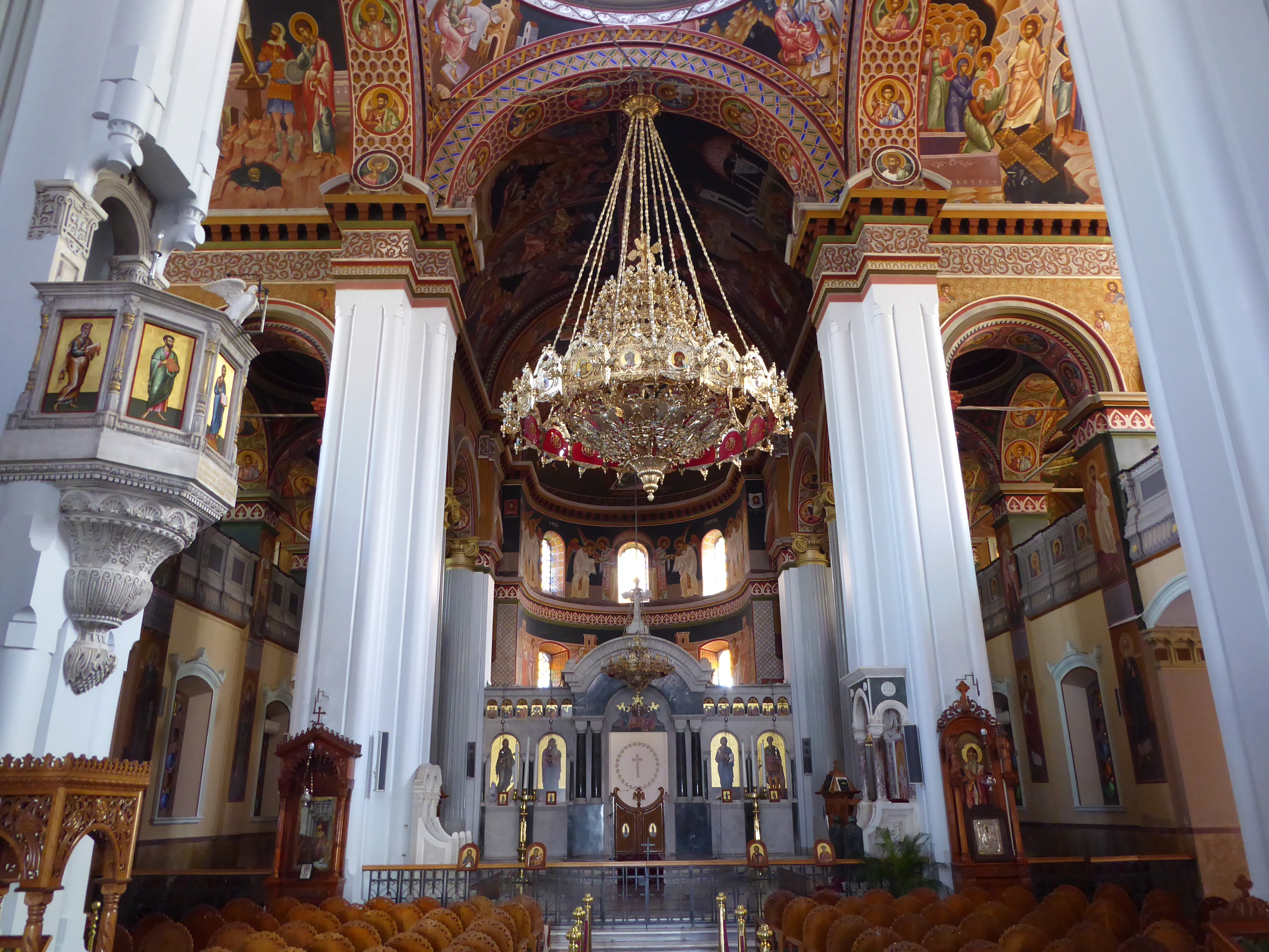 Minas Kathedrale -Innenansicht mit Ikonostase, Leuchter, Kanzel